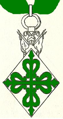 Eigen tekening Robert Prummel